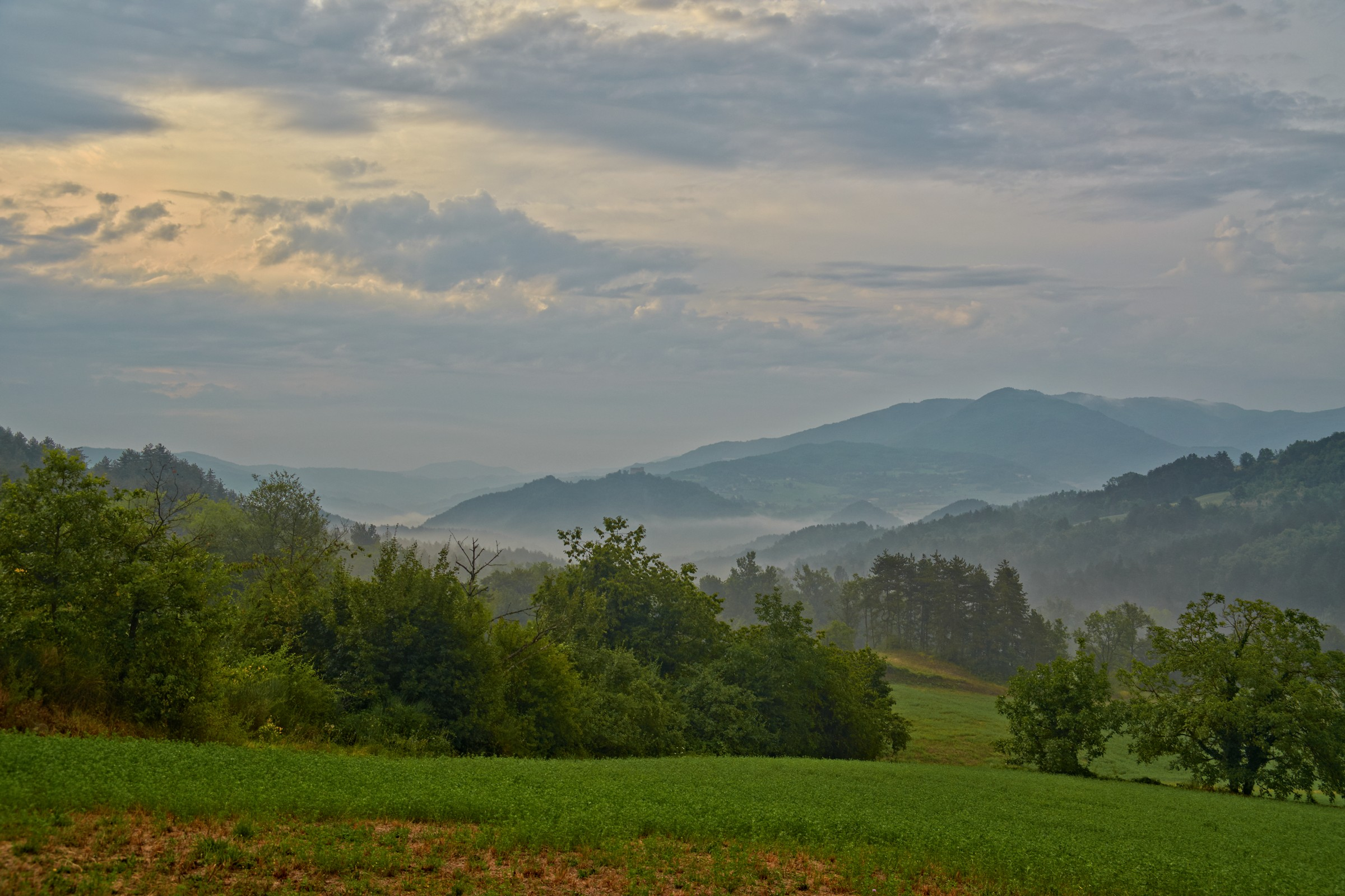 Veduta verso Zavattarello e il Calenzone